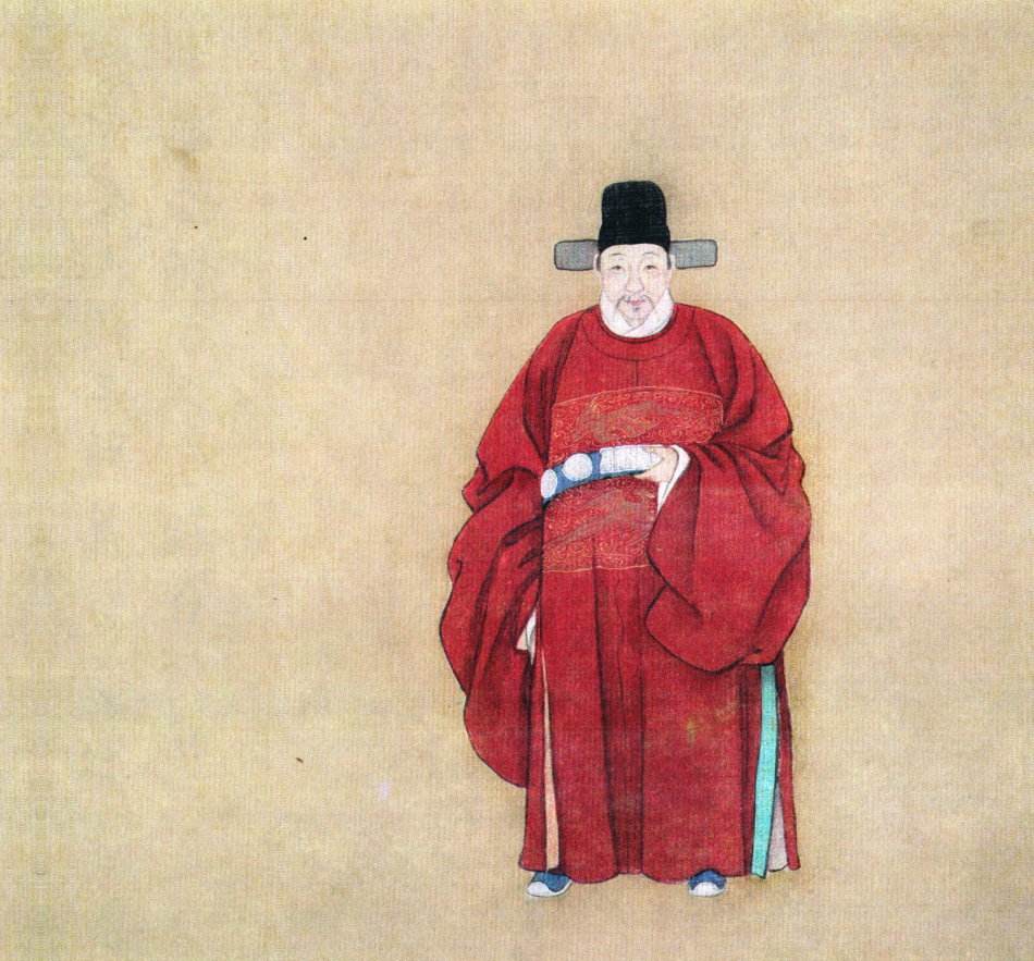 单国祚，字柱明，松江府华亭县人。天启五年进士，官南京工部主事，官至工部郎中。